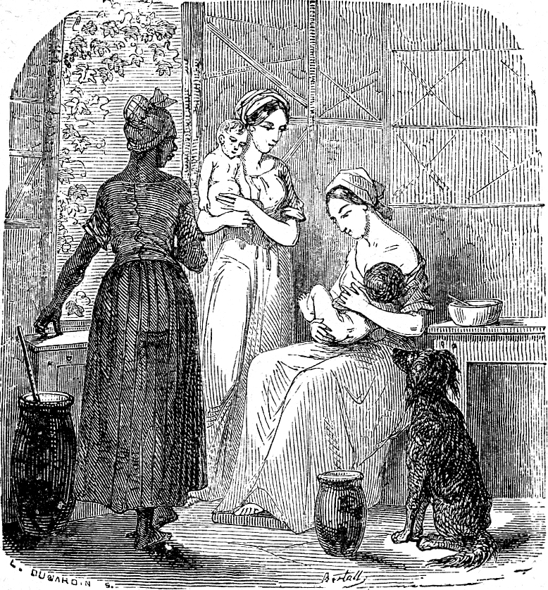 Paul and Virginie (1787) by Bernardin de Saint-Pierre (1737-1814)